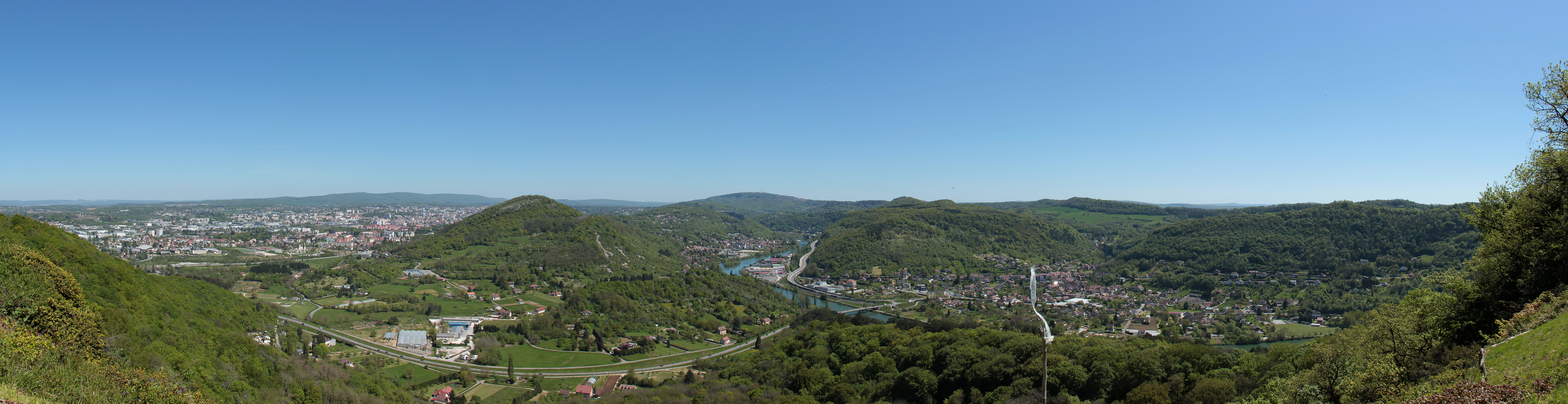 Panorama de la cluse de la Malcombe et de la vallée du Doubs, à l'ouest de l'agglomération bisontine.